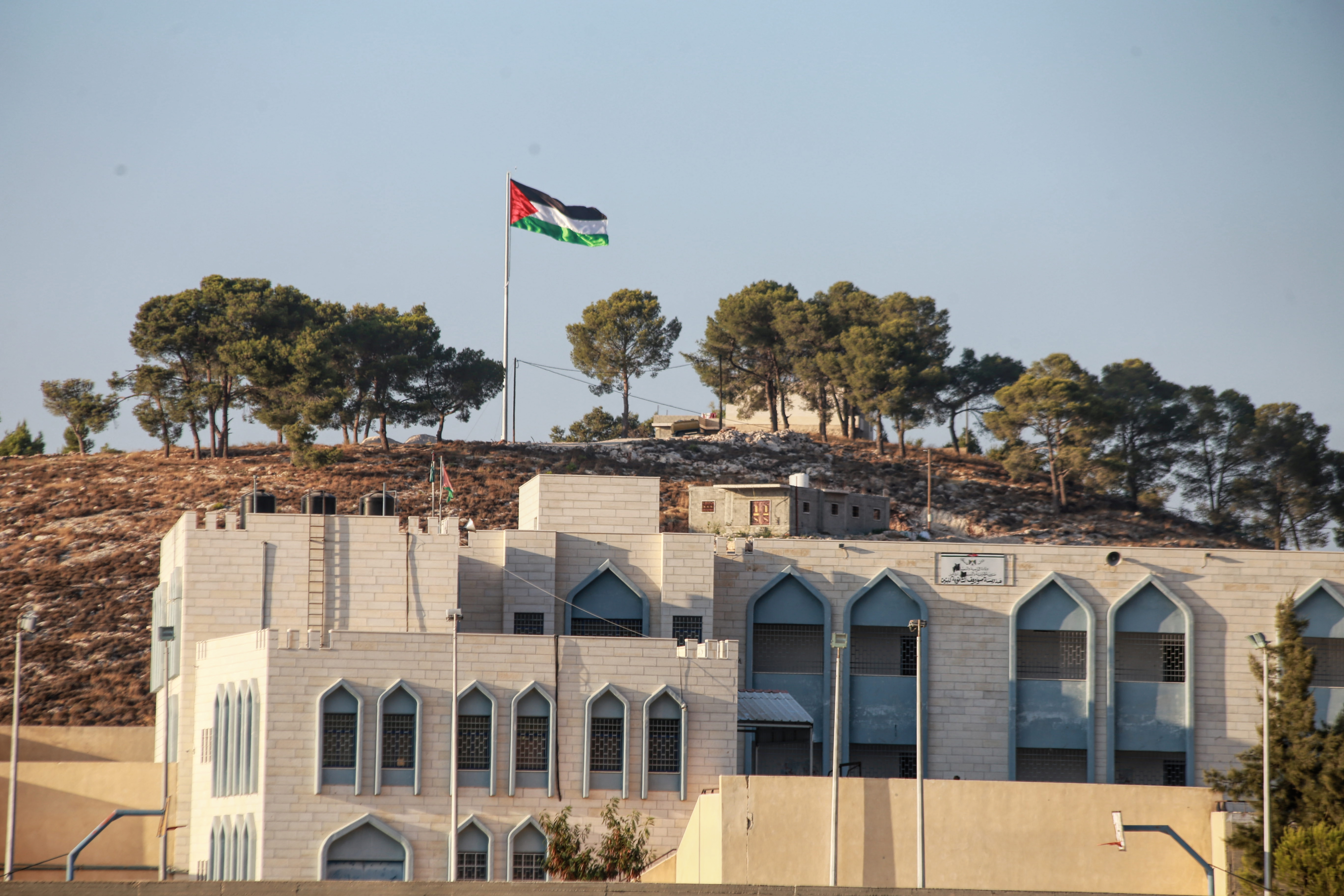 مدرسة صوريف الثانوية